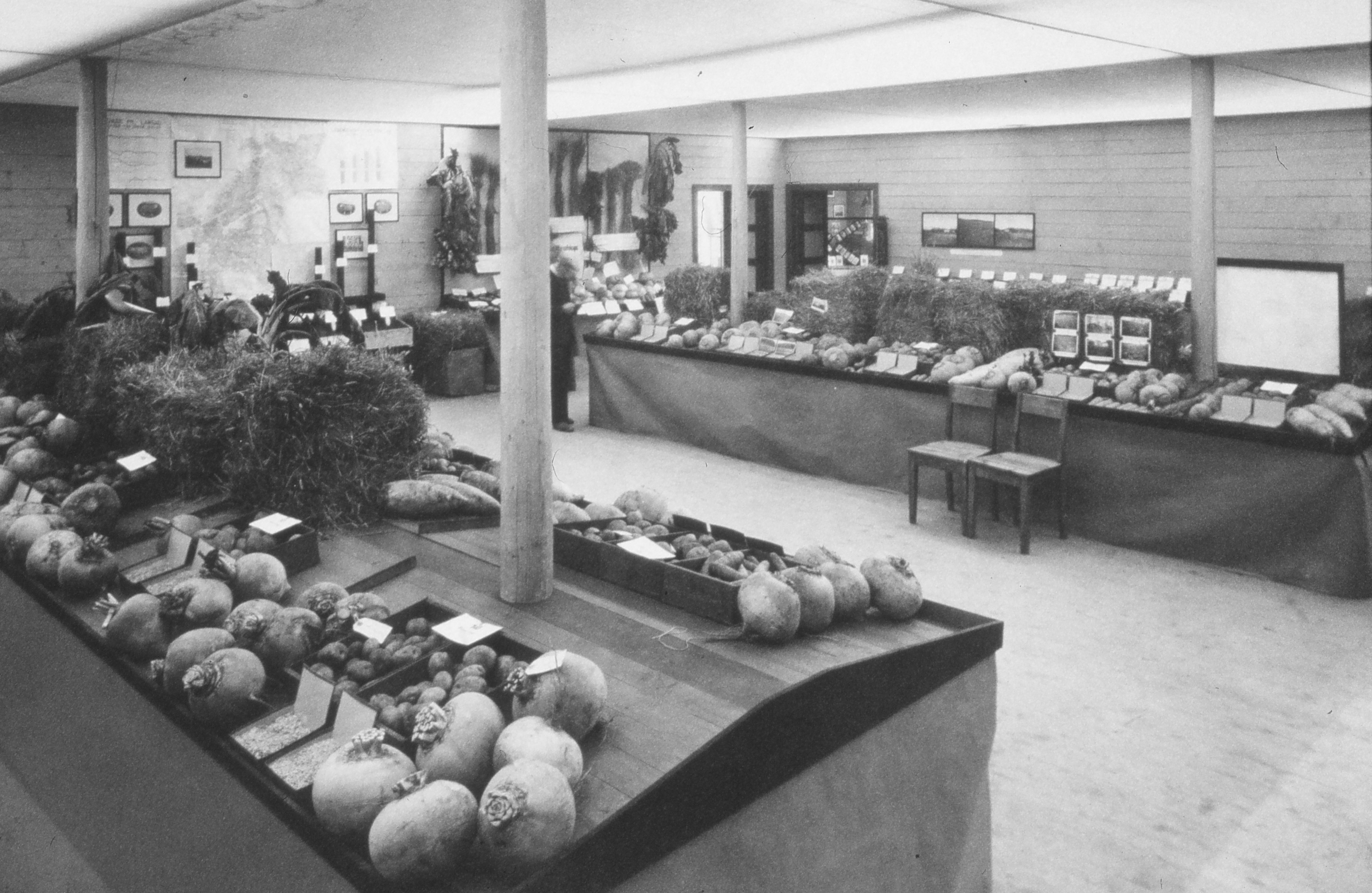 Grøntutsalg på Trøndelagsutstillinga. Fra Byantikvarens lysbildesamling.